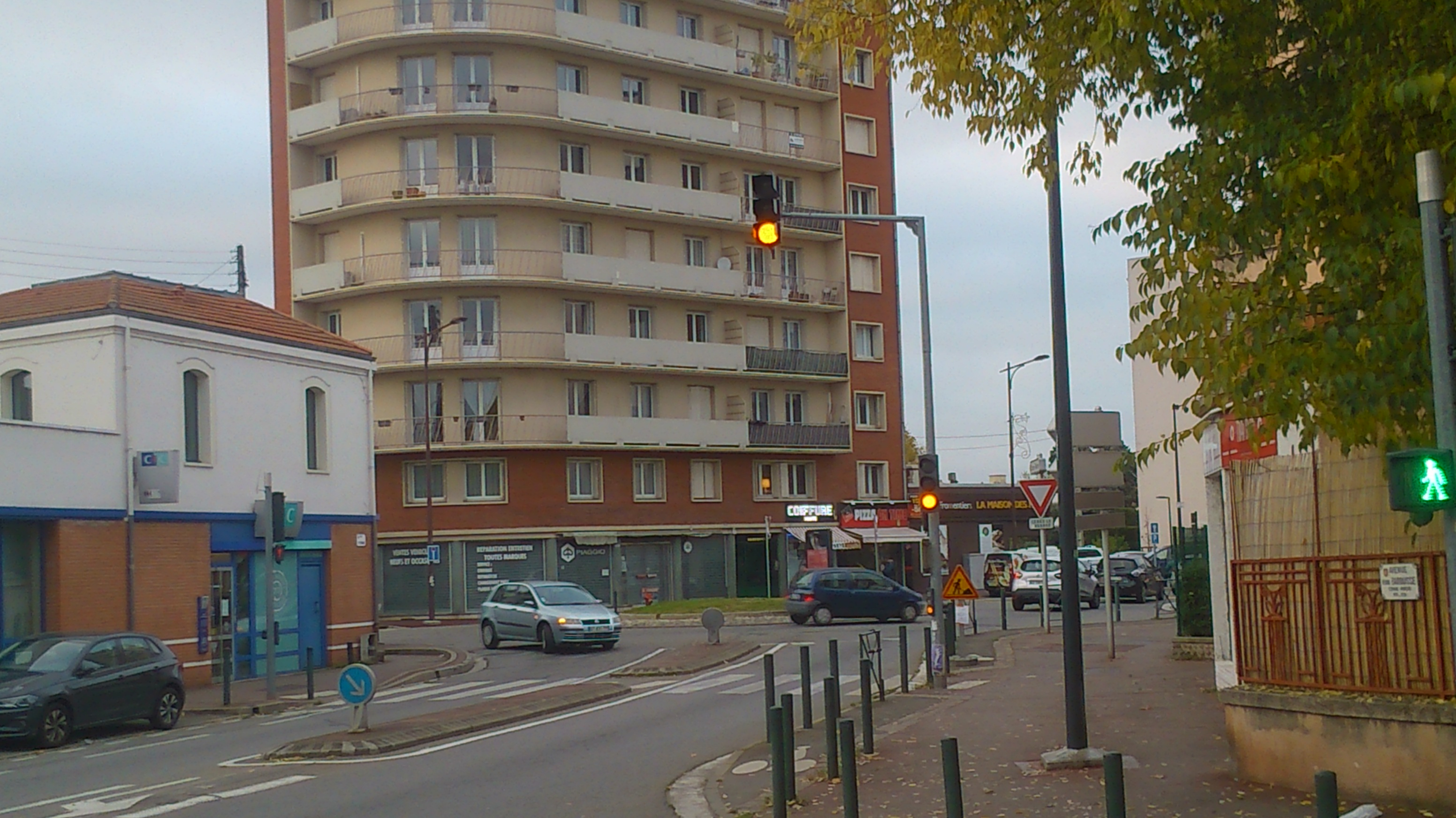 La barrière de Muret à la Croix de Pierre, à Toulouse.